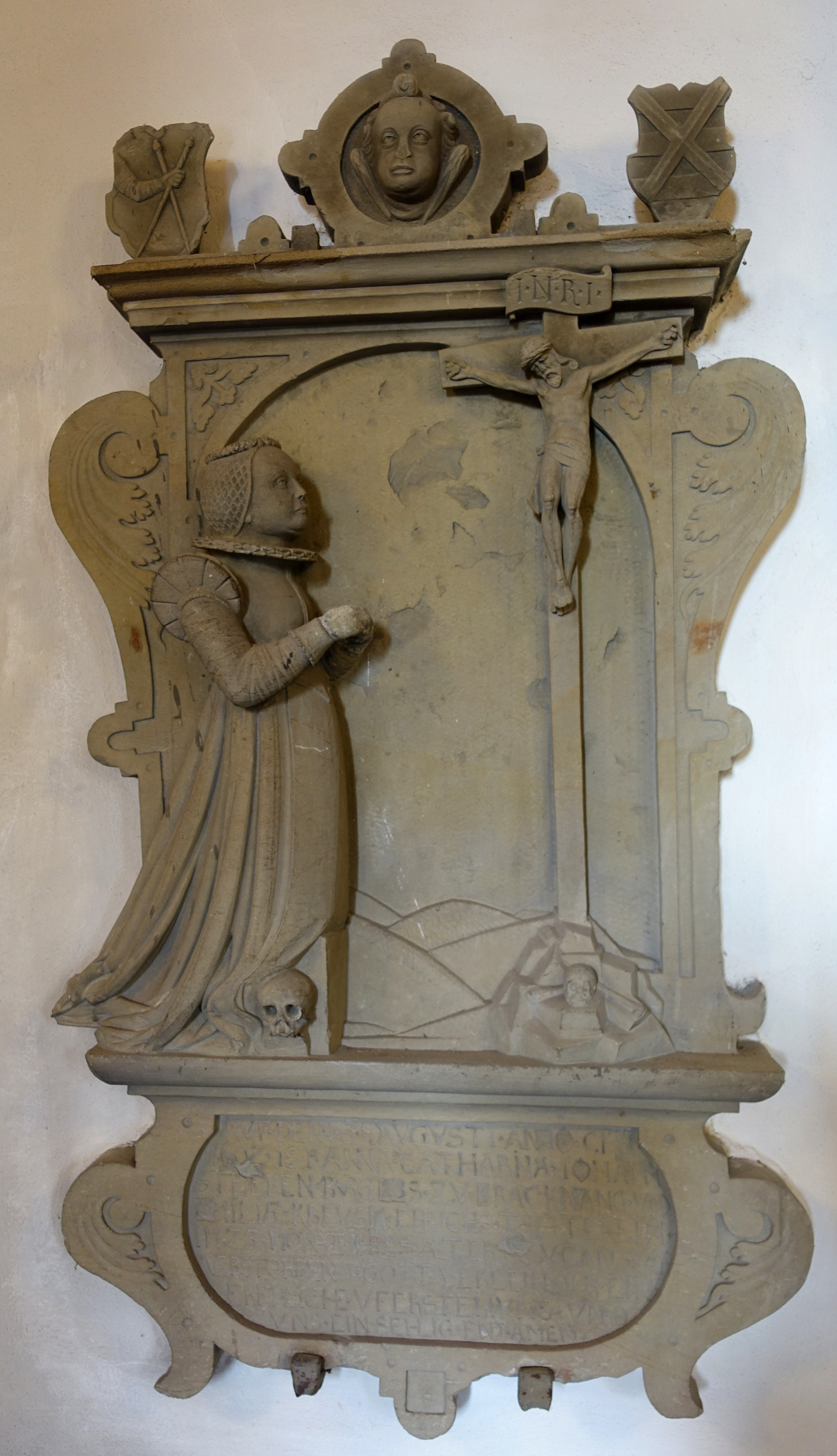 Epitaph an der Nordwand in der Uffkirche auf dem Uff-Kirchhof in Stuttgart-Bad Cannstatt für Anna Catharina Johanna Steeben, die 1602 mit 23 Monaten verstarb.